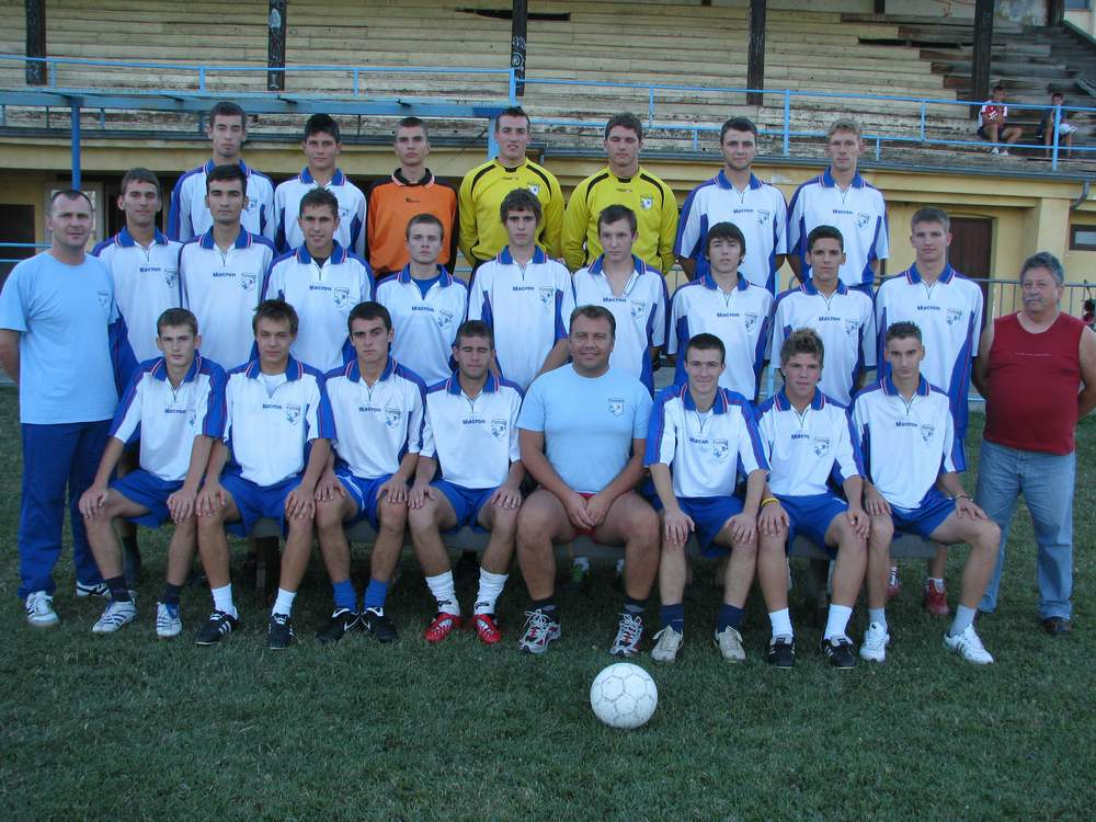 nogometni klub ŠNK Baranja-Belje, Beli Manastir